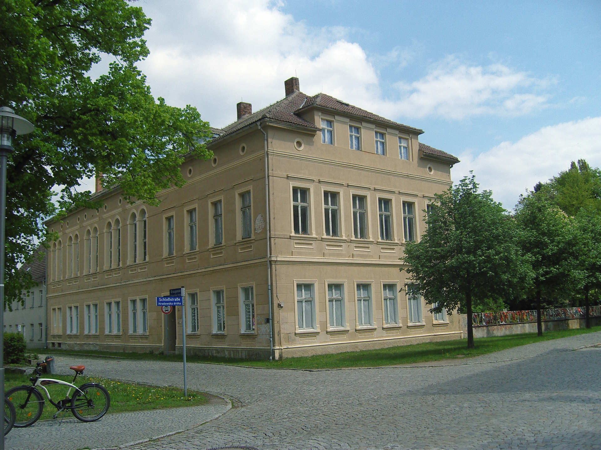 spätklassizistisches unter Denkmalschutz stehendes Gebäude von 1885 in der Braugasse 1 am Markt in Hoyerswerda im Mai 2010; Ball- und Gesellschaftshaus, ab 1912 REFORM-REAL-GYMNASIUM, 1937 Umbenennung in Lessing-Gymnasium, ab 1957 Behelfsgebäude für die Schulen während des Neustadt-Aufbaus in Hoyerswerda, ab 1975 Pionierhaus Grete Walter, ab 1992 Kinder- und Jugendtreff am Markt, 1996-2000 Soziokulturellen Zentrum der Stadt Hoyerswerda (1912 Gründung der Domowina, 1928 Abitur Konrad Zuses)